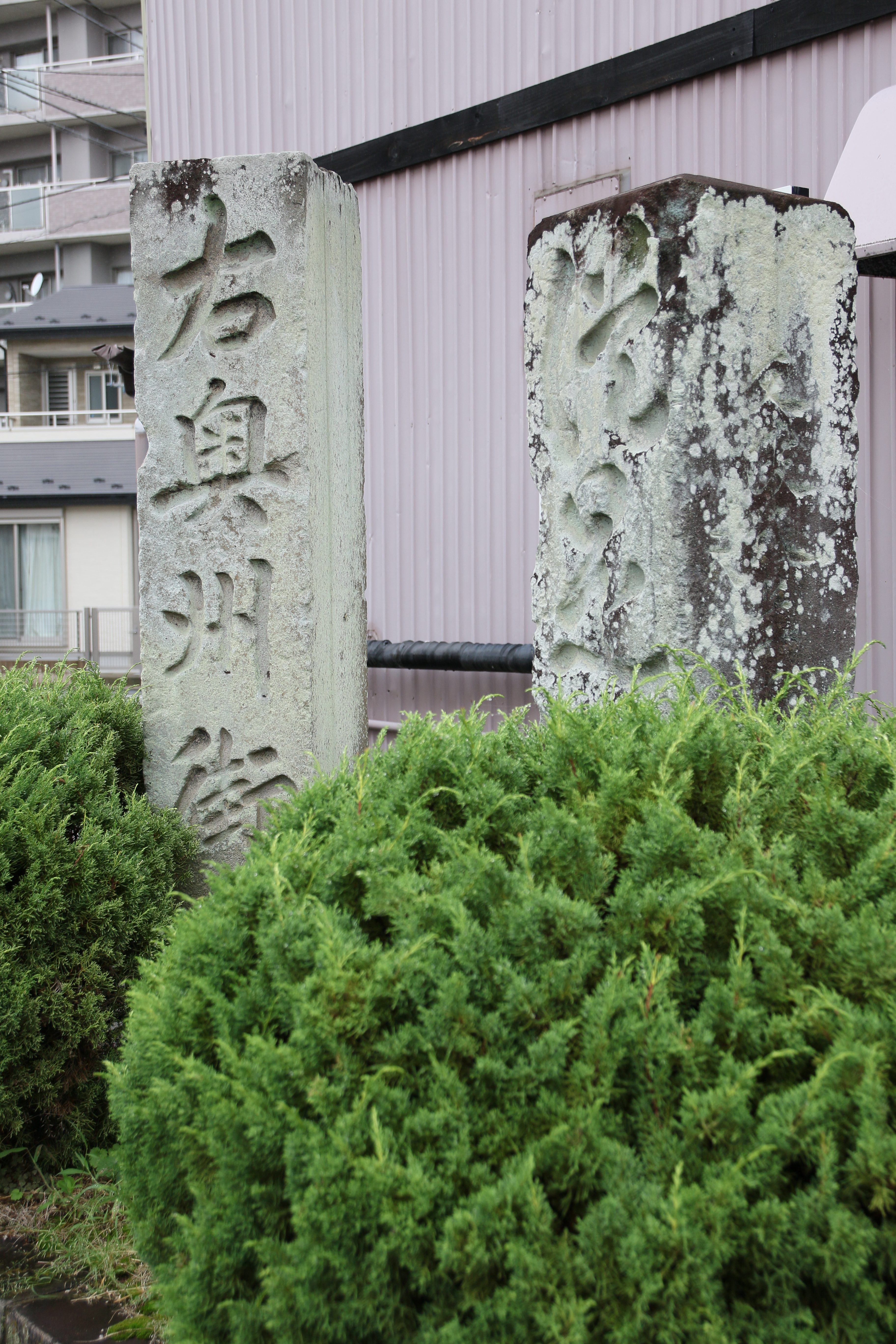 奥州街道郡山宿の道標 Canon EOS 7D Mark II